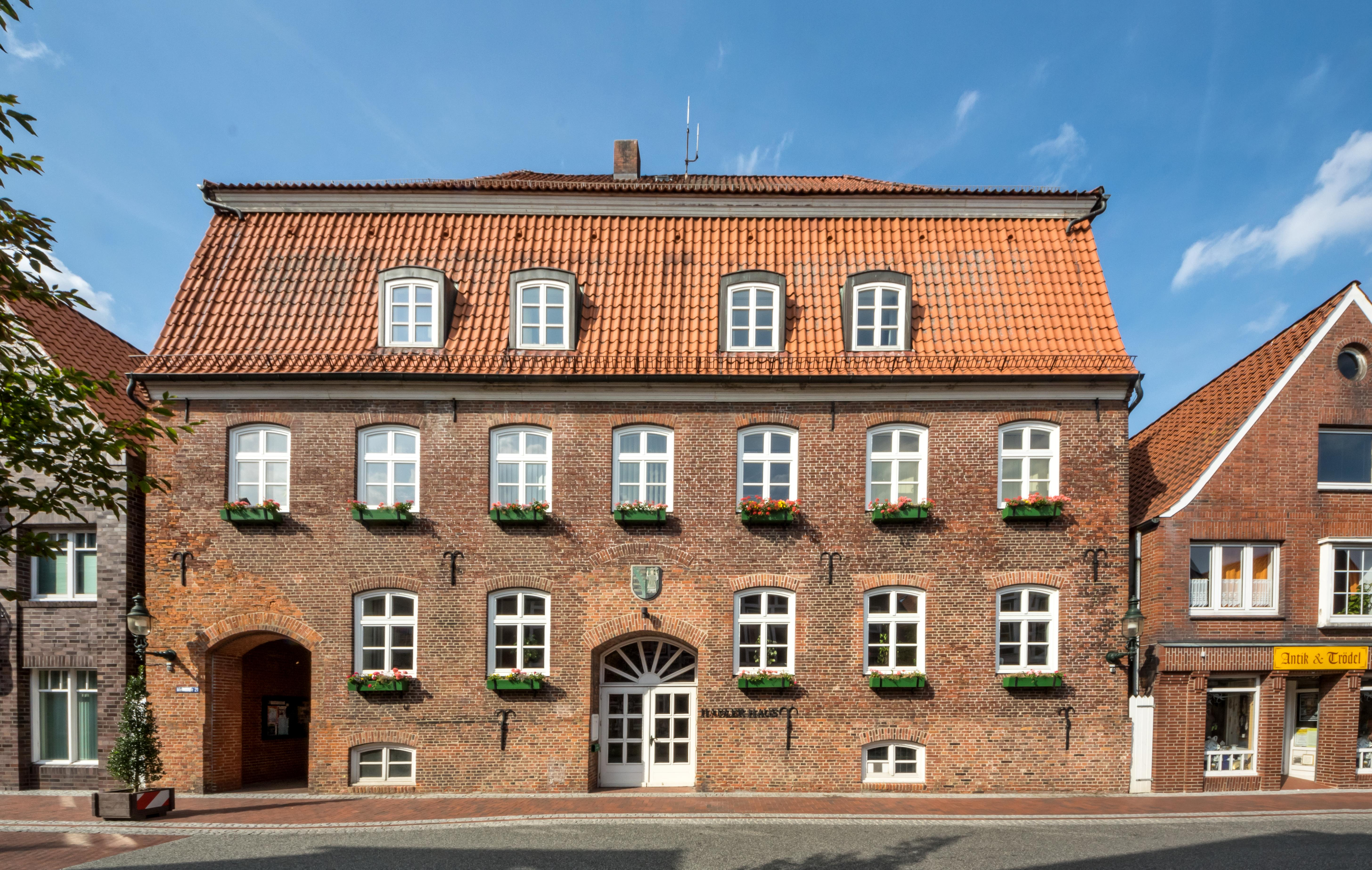 Bilder aus Otterndorf Denkmalgeschützte Gebäude Hadler Haus